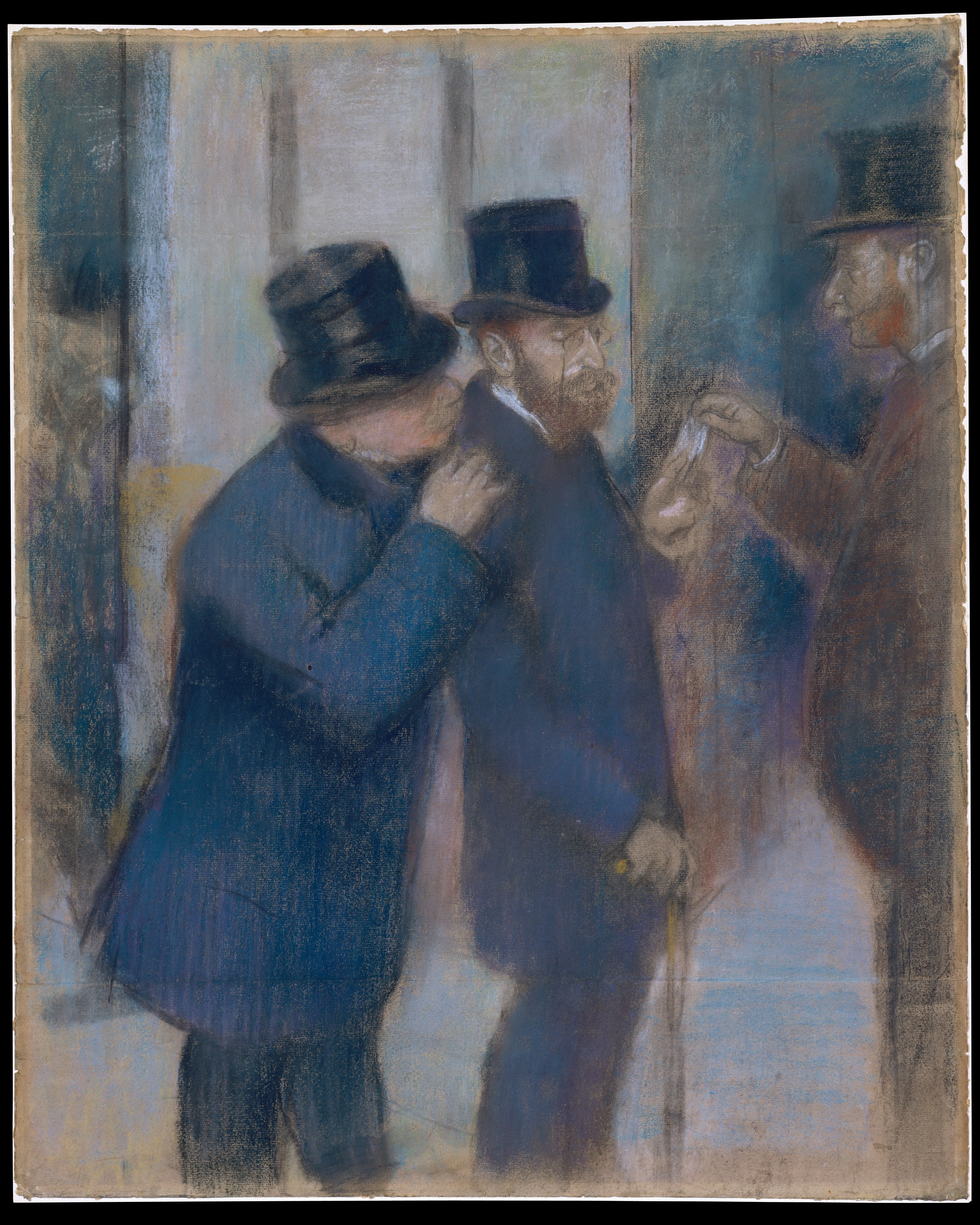 Drawing; Drawings